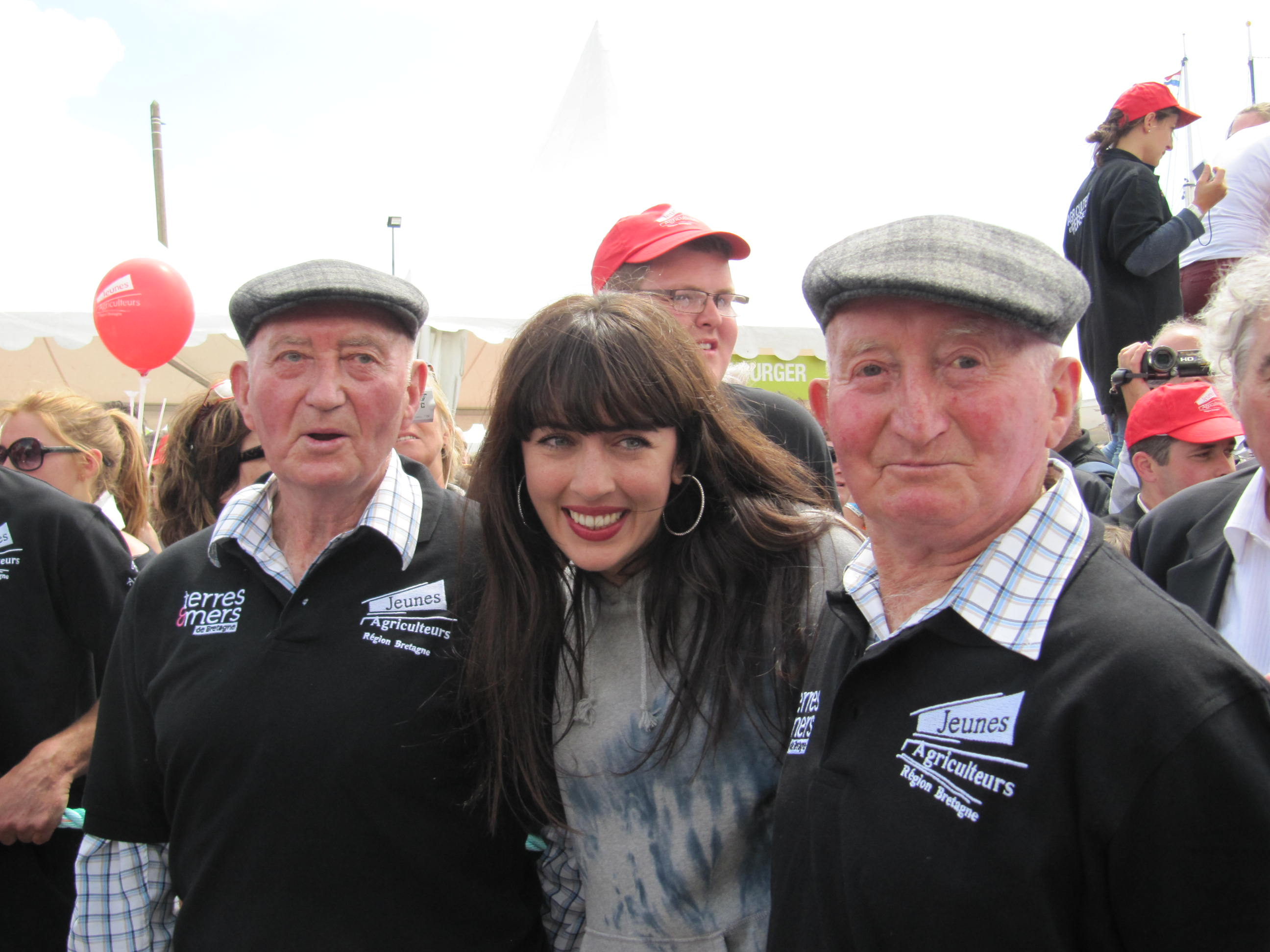 Nolwenn Leroy et les Frères Morvan sur le village Terres et mers durant les Tonnerres de Brest 2012